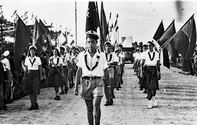 אלי לוי מוביל את קבוצת השומר הצעיר בתהלוכת יום הים 1950